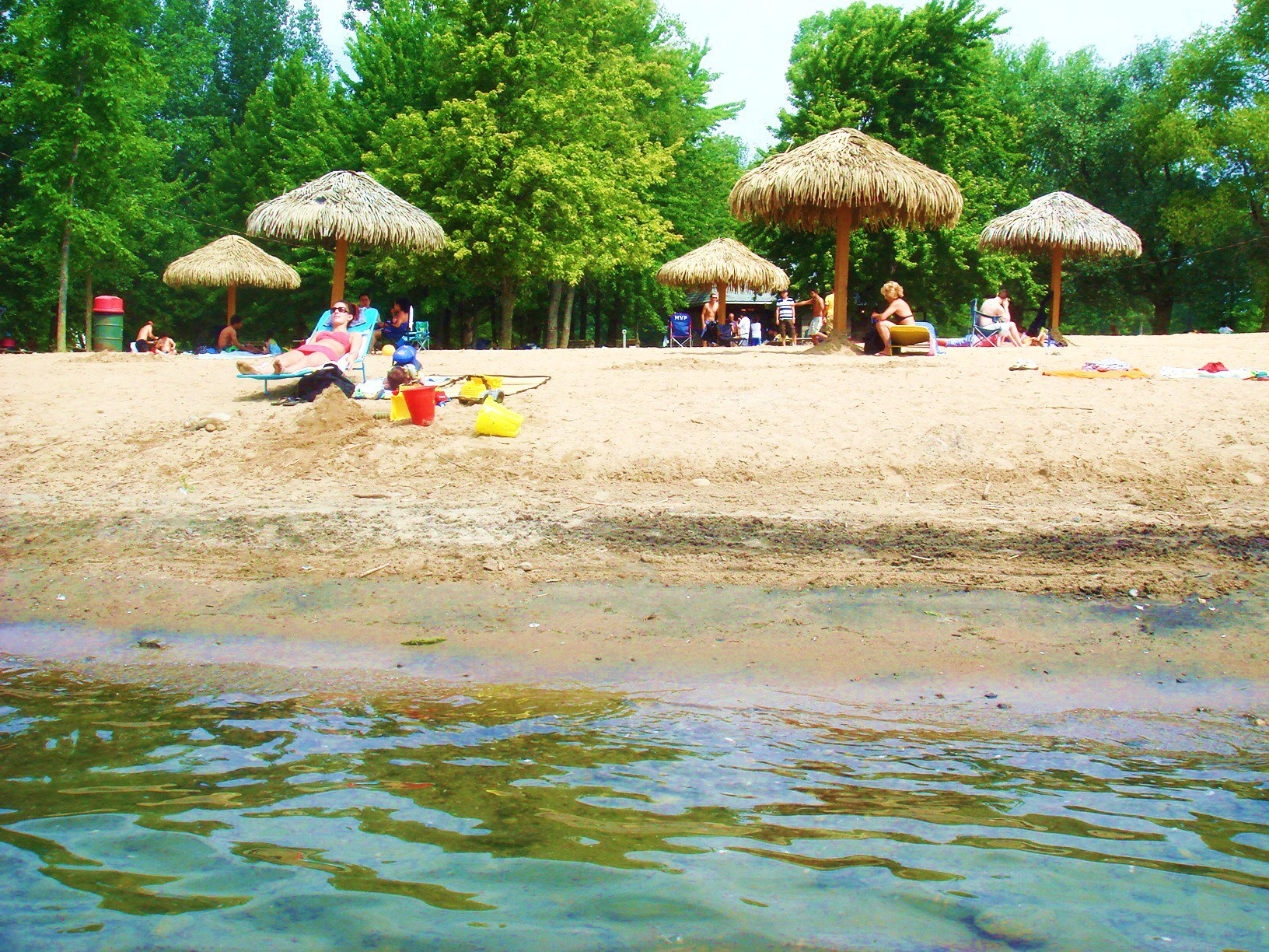 Plage St-Zotique, QC